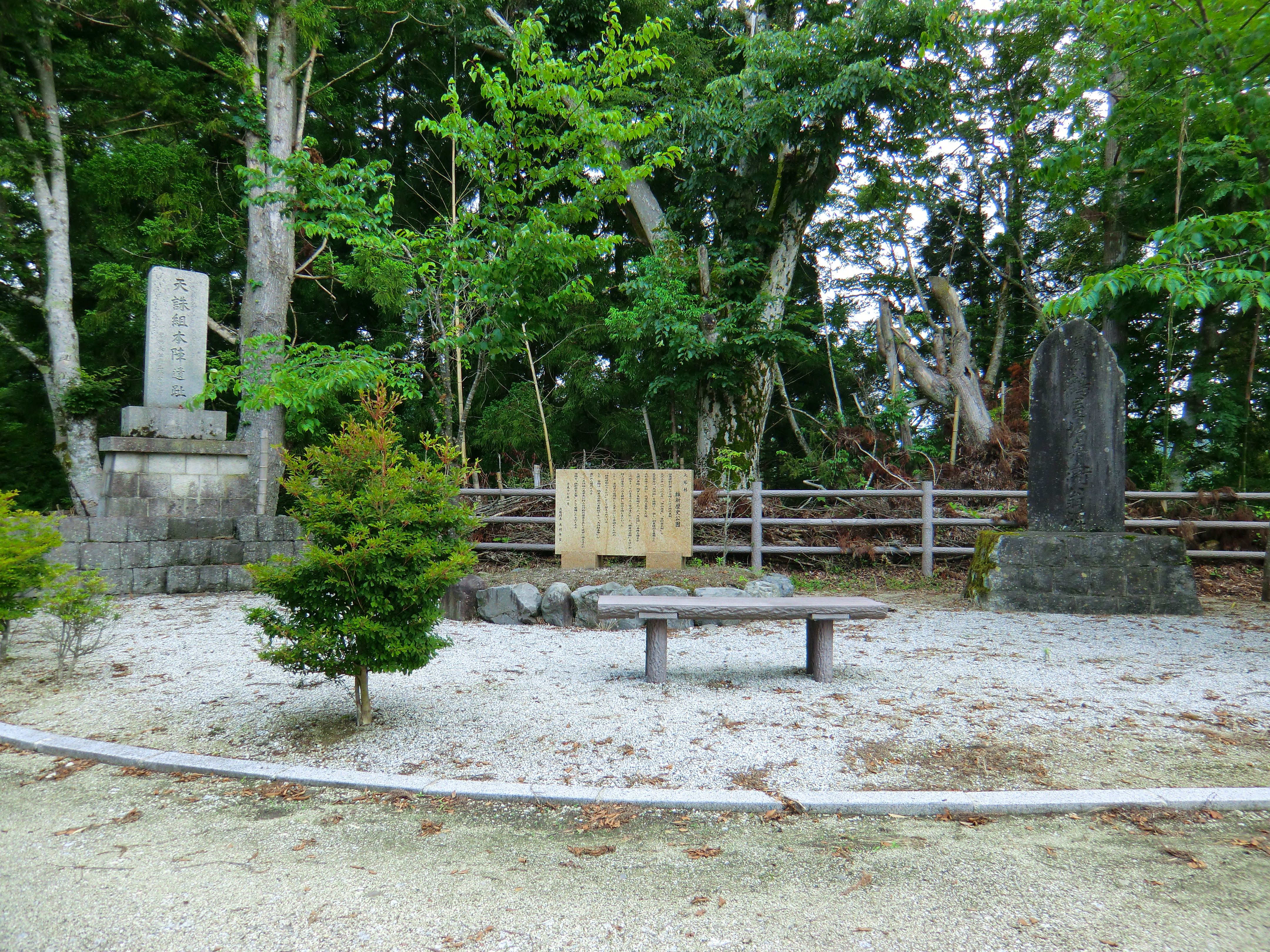 天辻の天誅組本陣跡